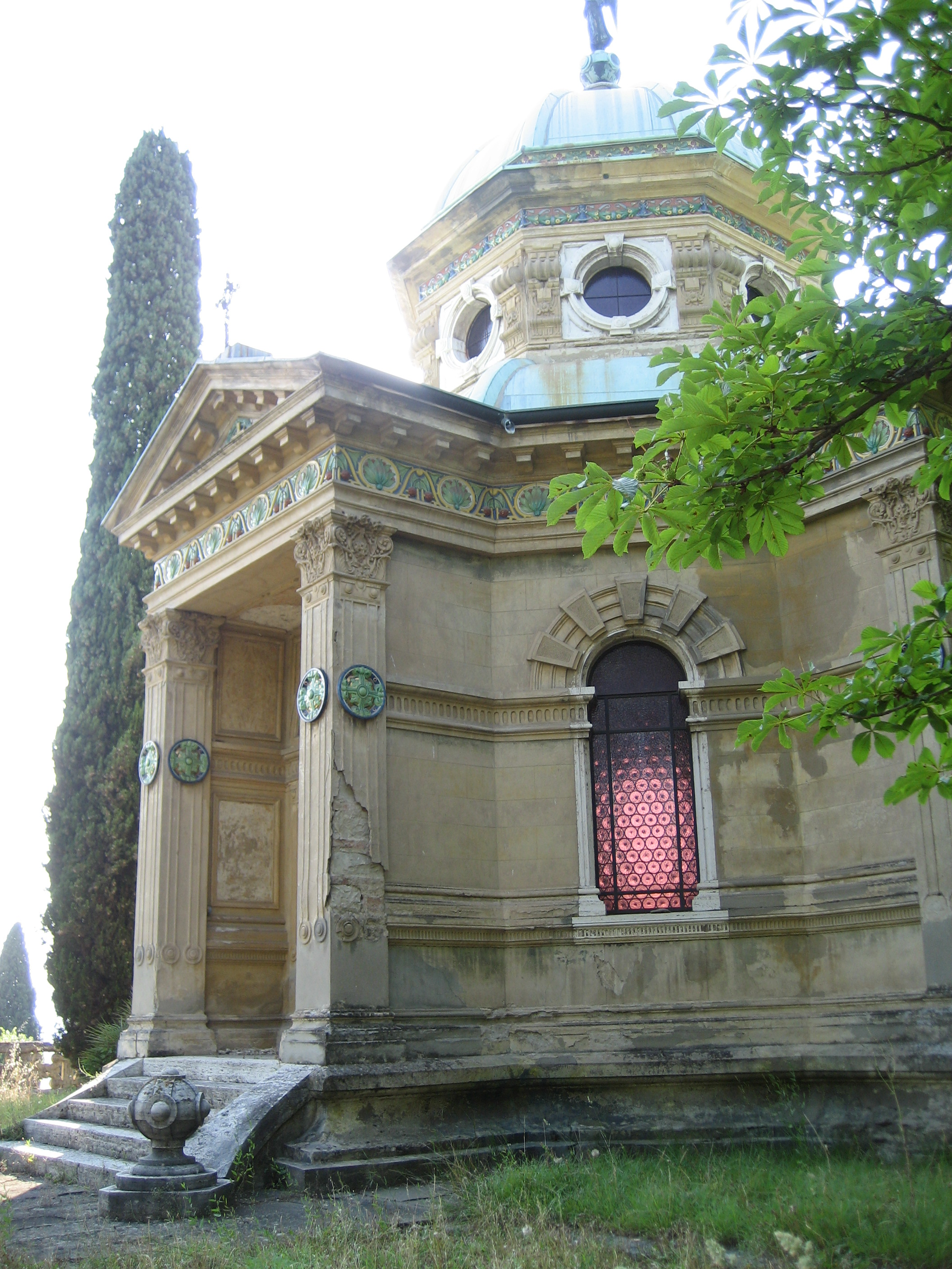 cappella villa peragallo